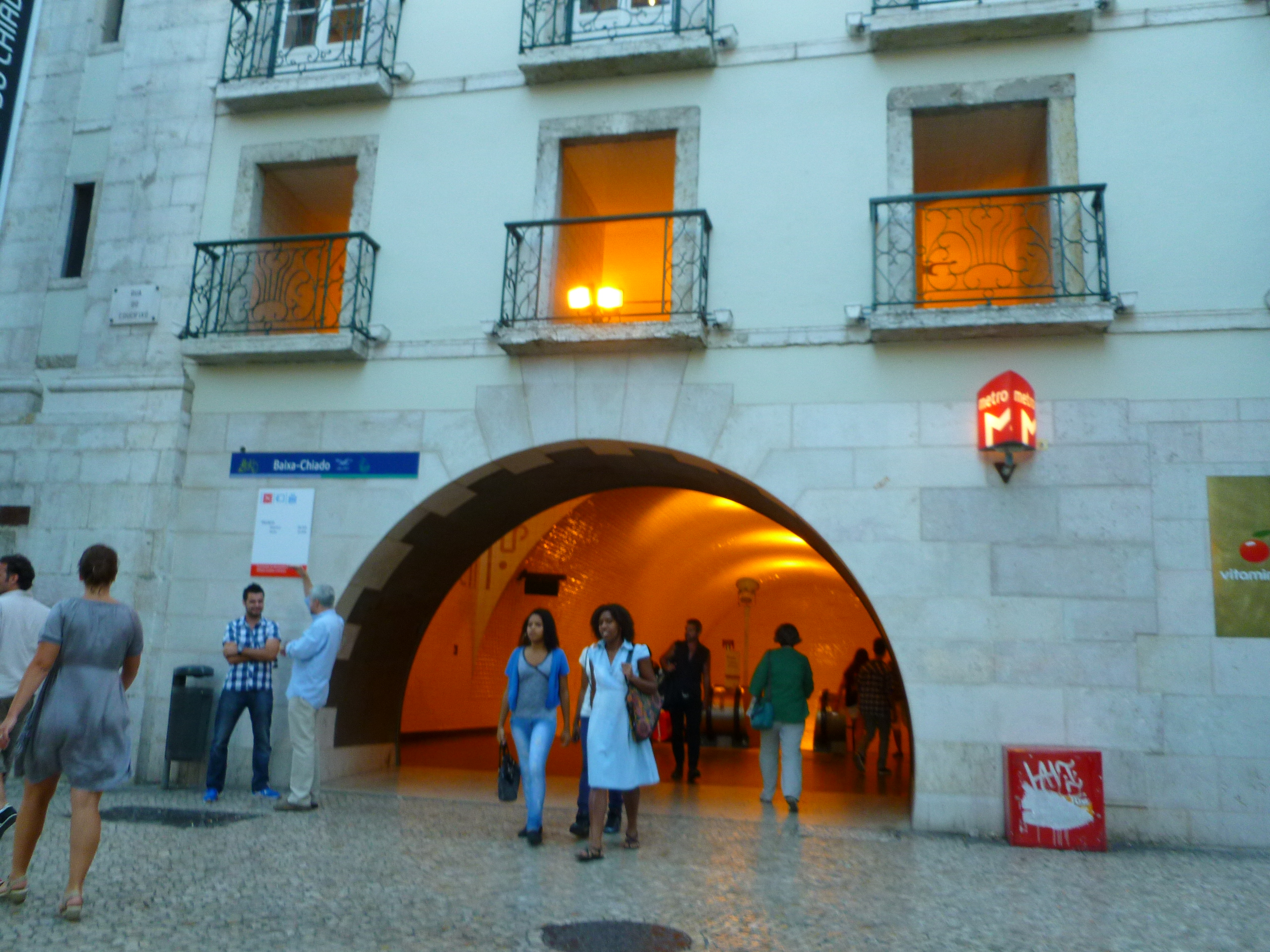 la foto rappresenta l ingresso della stazione